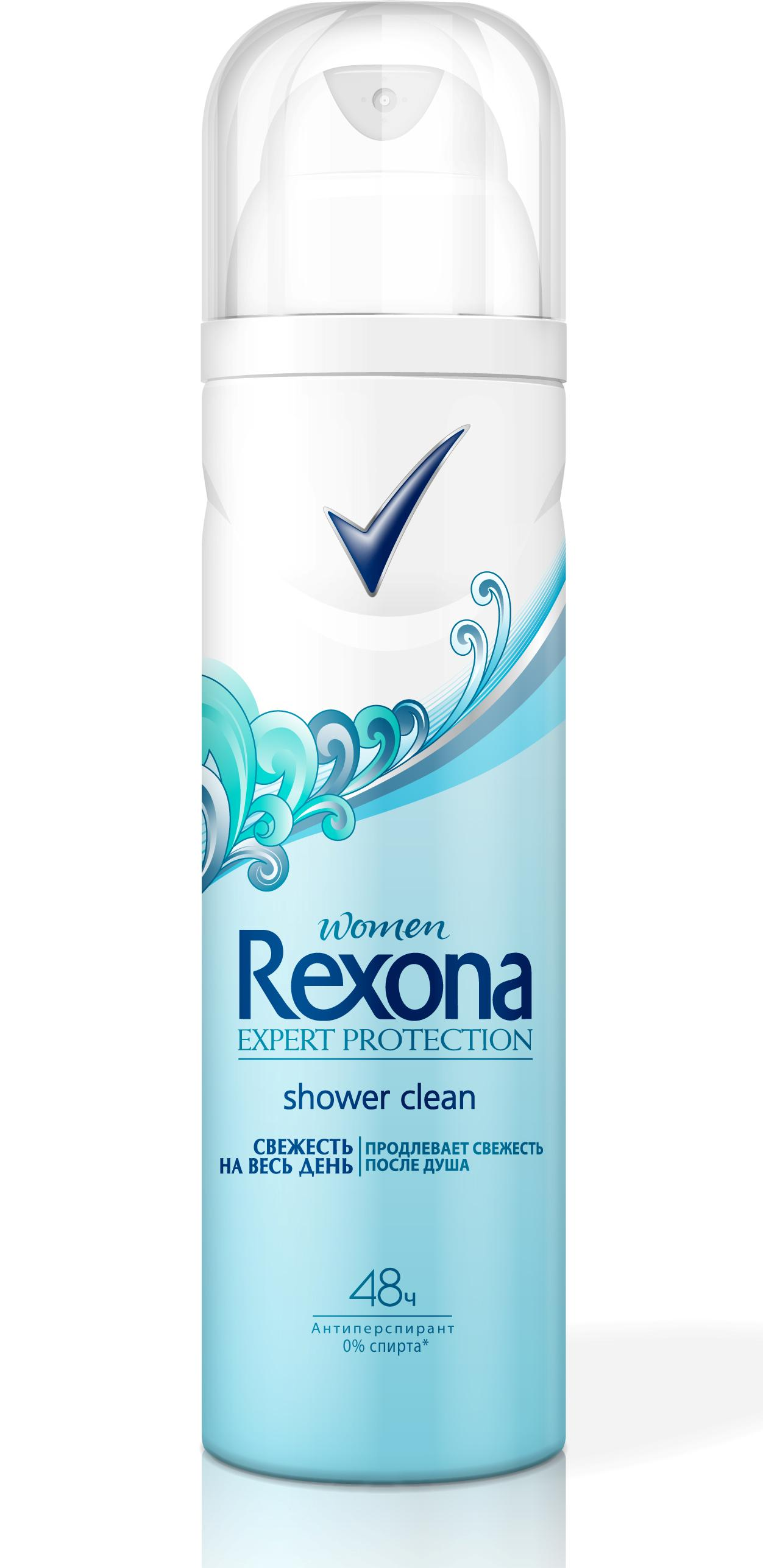 Спрей Рексона